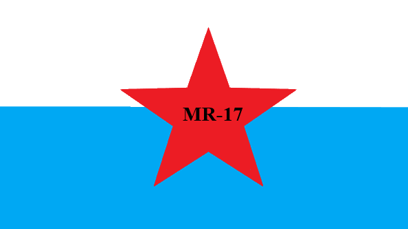 Bandera del grupo guerrillero MR 17